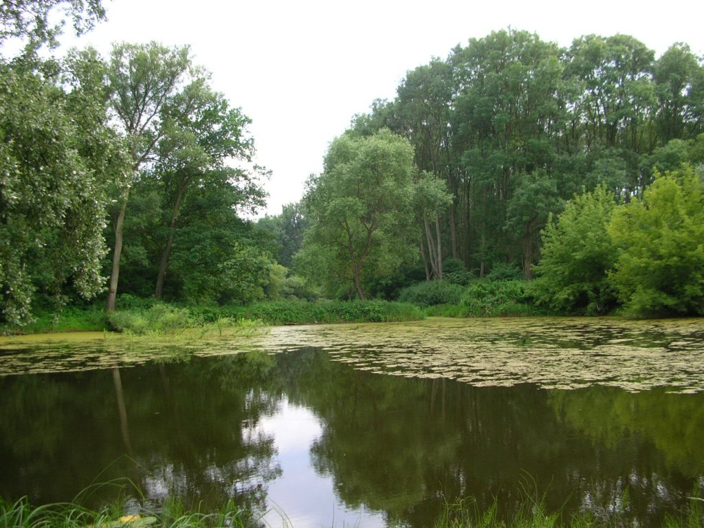 Wielka Kępa Ostromecka k. Bydgoszczy